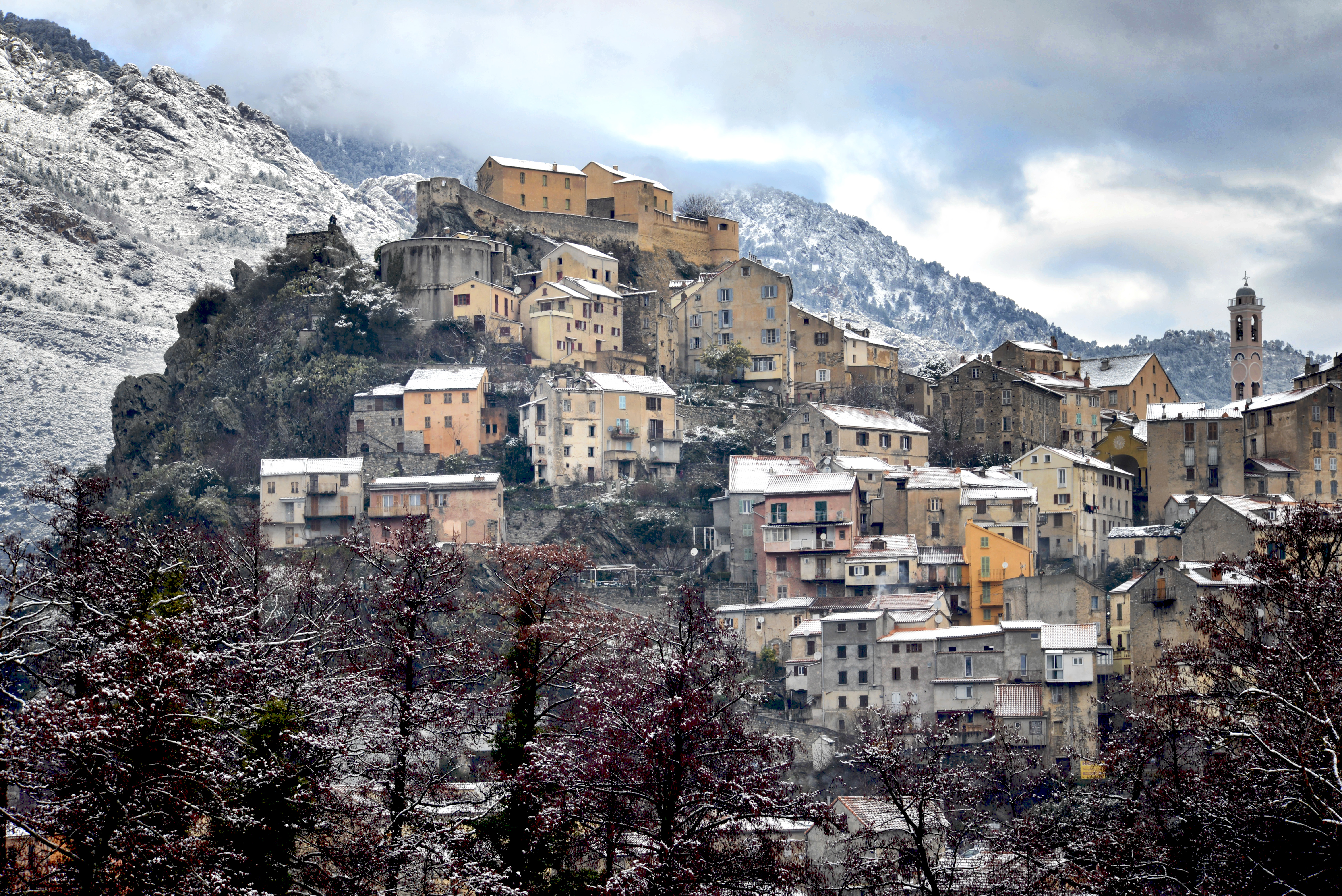 Corte, Centre Corse - La citadelle au matin du 19-01-2016